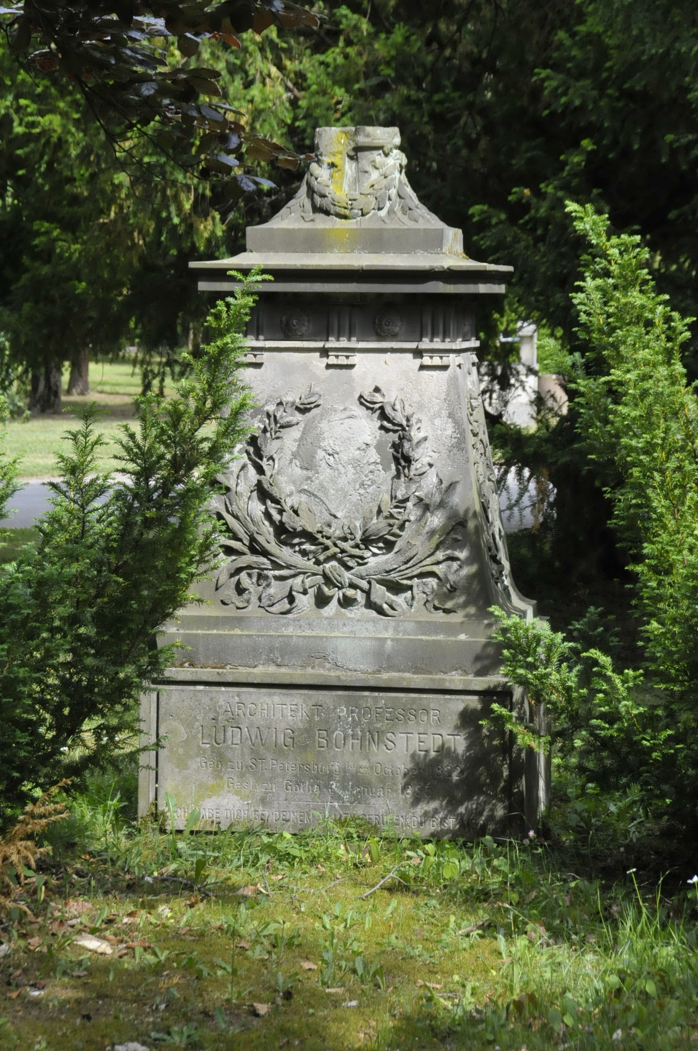 Grabstein des Ludwig Bohnstedt